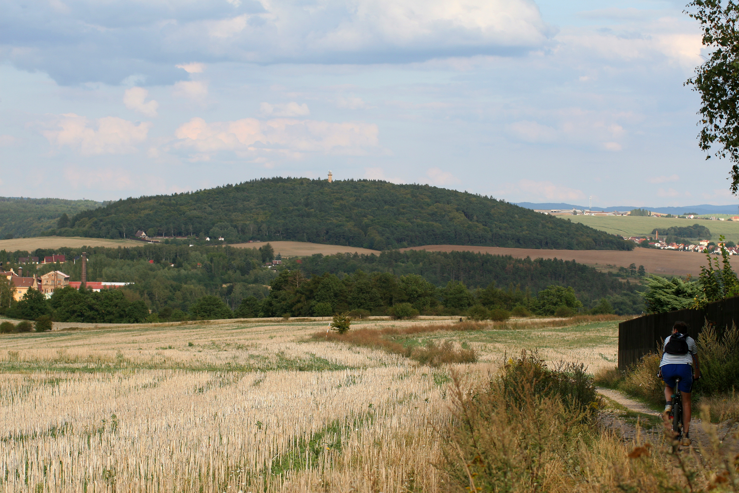 Vrchol Chlum (416 m) na severovýchodním okraji Plzně v pohledu od Mikulky.